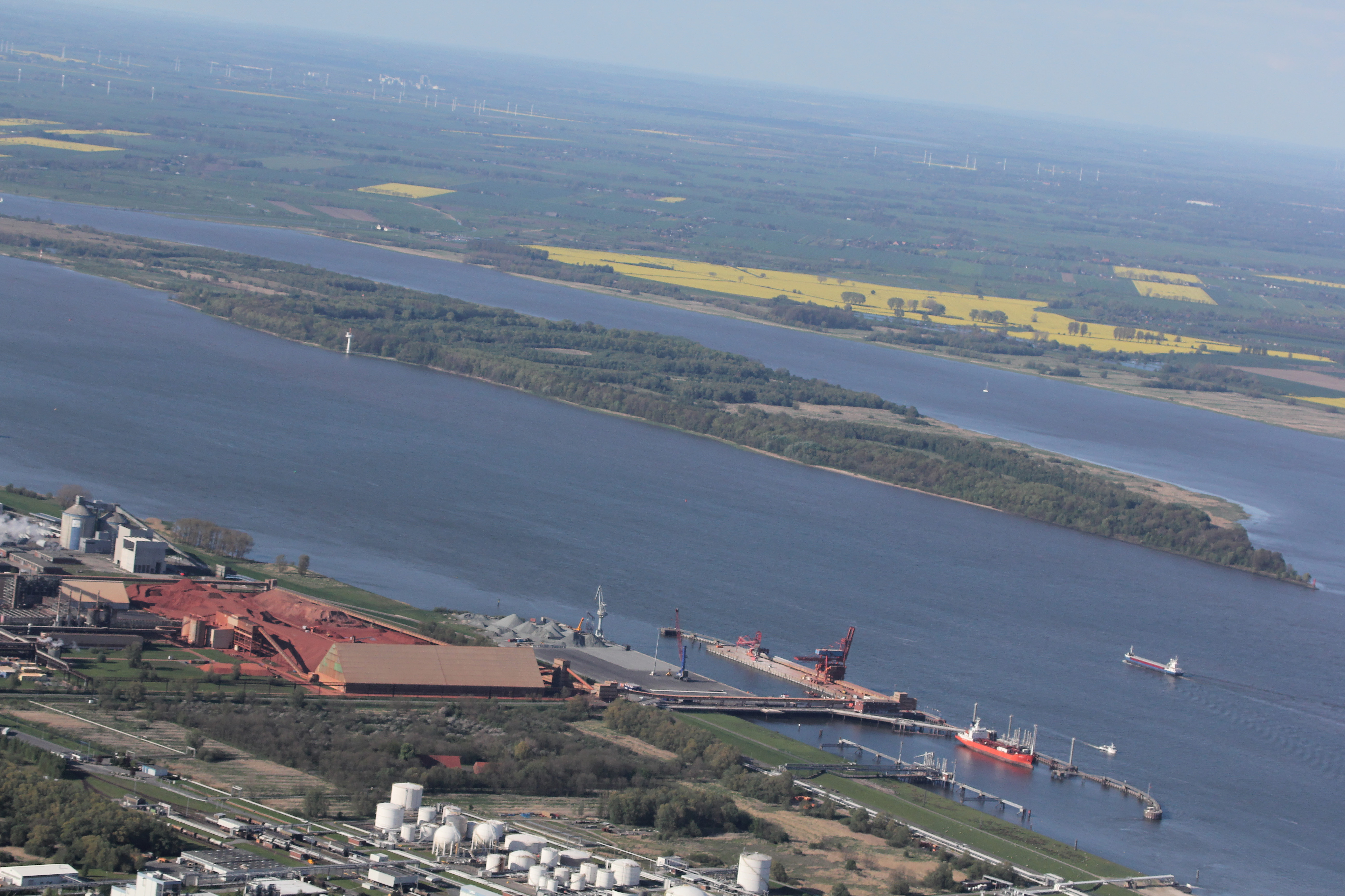 Luftaufnahme: die Elbinsel Pagensand